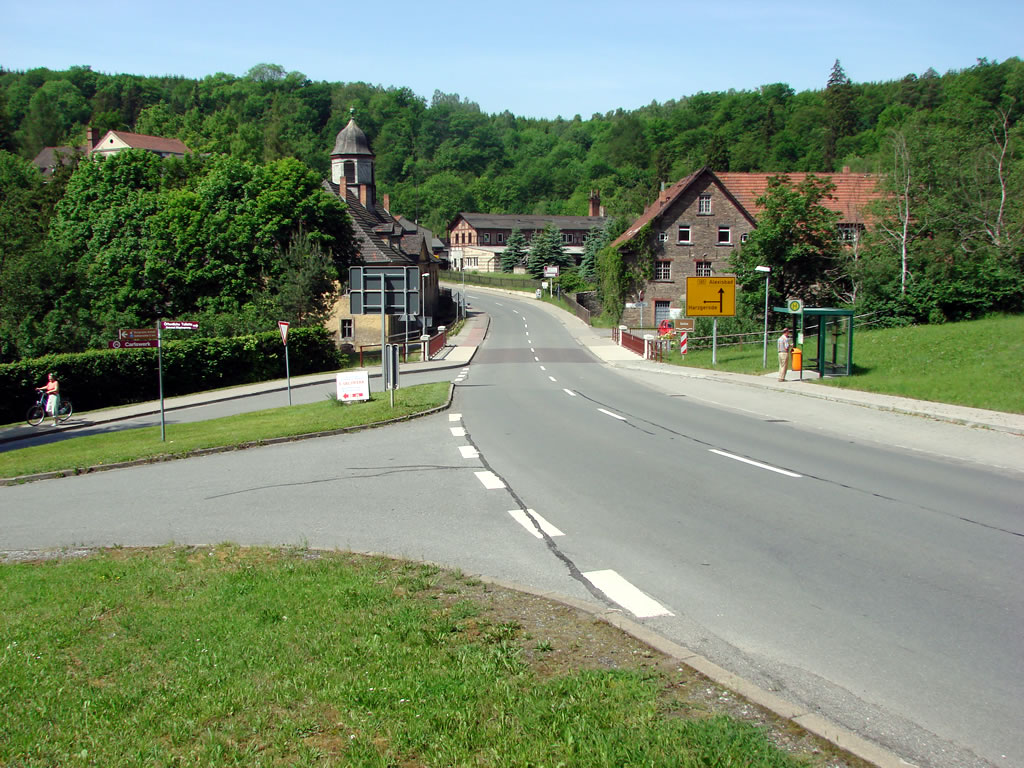 Mägdesprung im Selketal